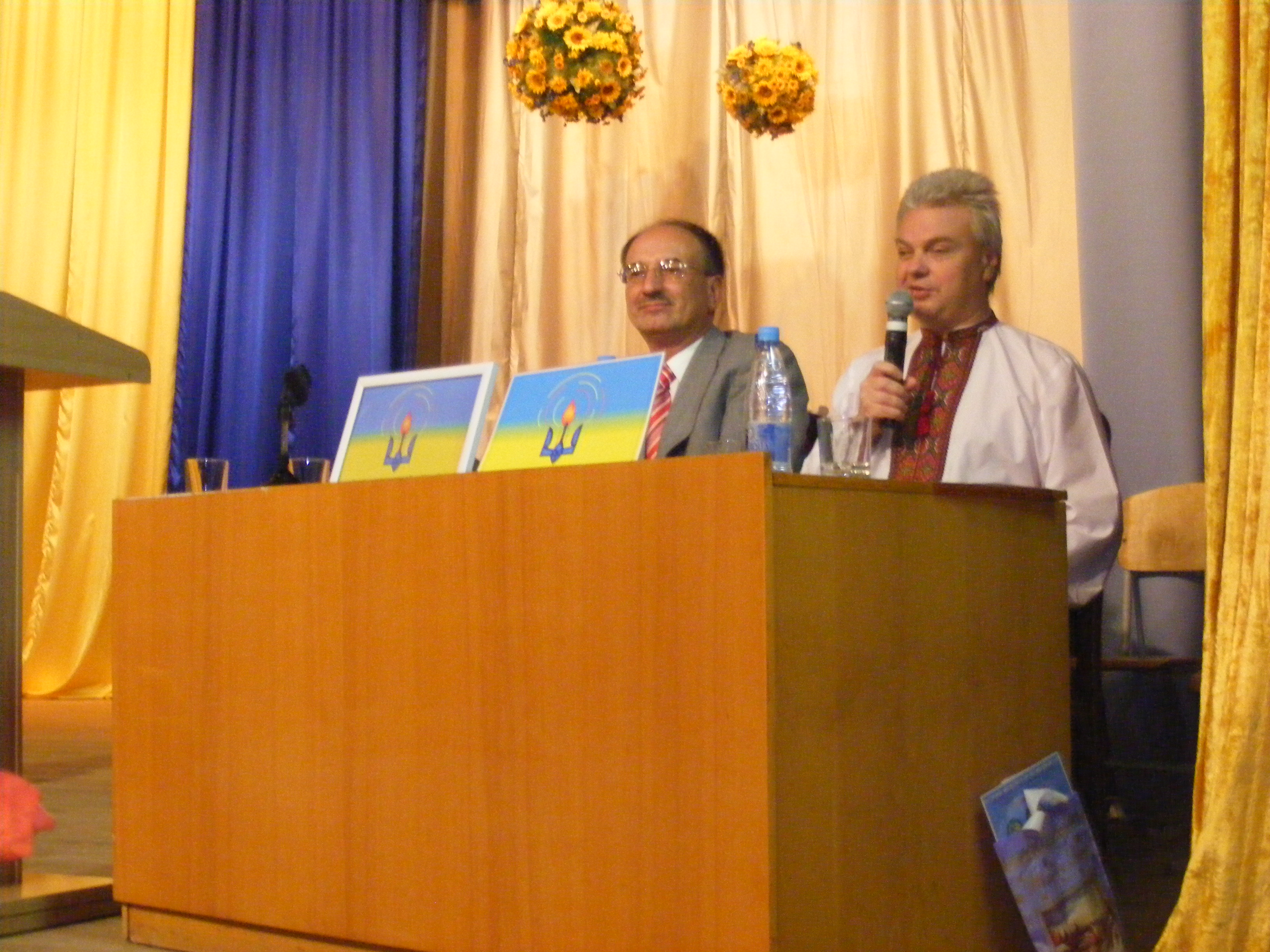 В президії Сергій Іванович Болтівець та Володимир Борисович Петровський